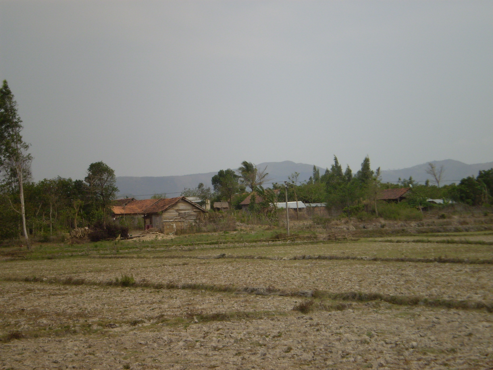 Một thôn của xã Cưêwi tỉnh Đắk Lắk, Việt Nam